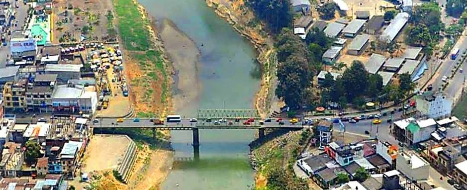 Viaducto de Ventanas